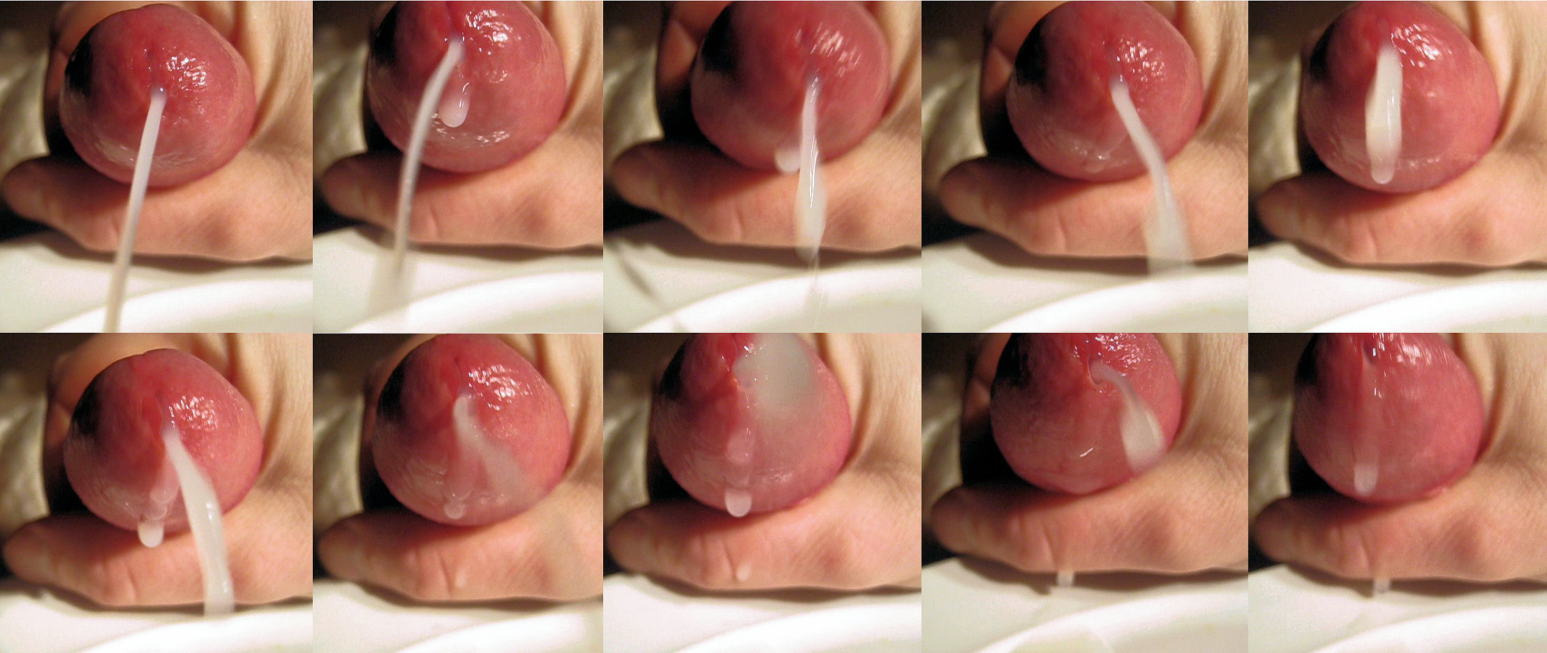 Utlösning och orgasm Utlösningens mängd, färg och även doft varierar och påverkas av hur ofta man har utlösning. Efter tre till fyra dagars uppehåll är volymen vanligtvis 2-6 milliliter - som en tesked eller något mer - och innehåller cirka 100 miljoner spermier per milliliter. När en man har stånd stängs öppningen till urinblåsan, så det finns ingen risk att det kommer urin i stället för sperma. Det innebär att sädesvätskan inte hamnar i urinblåsan vid utlösning.